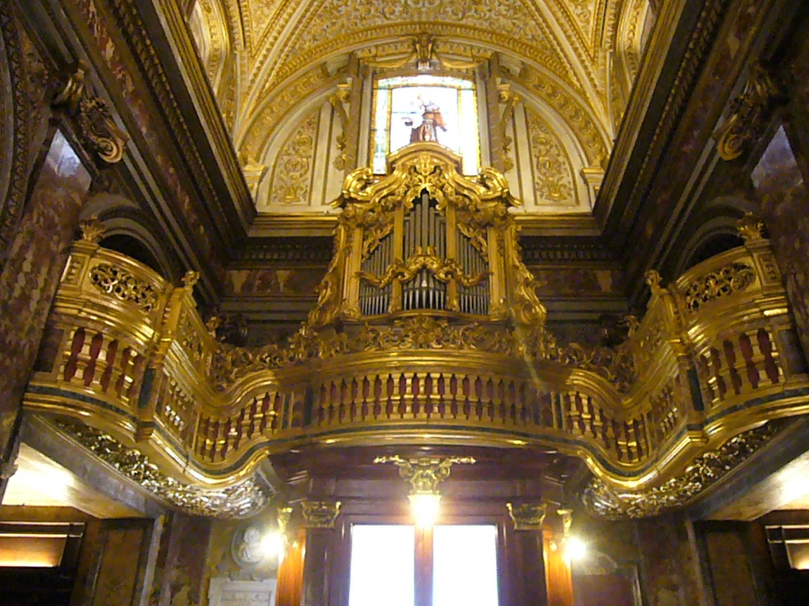 Roma, sant'Antonio dei Portoghesi: organo